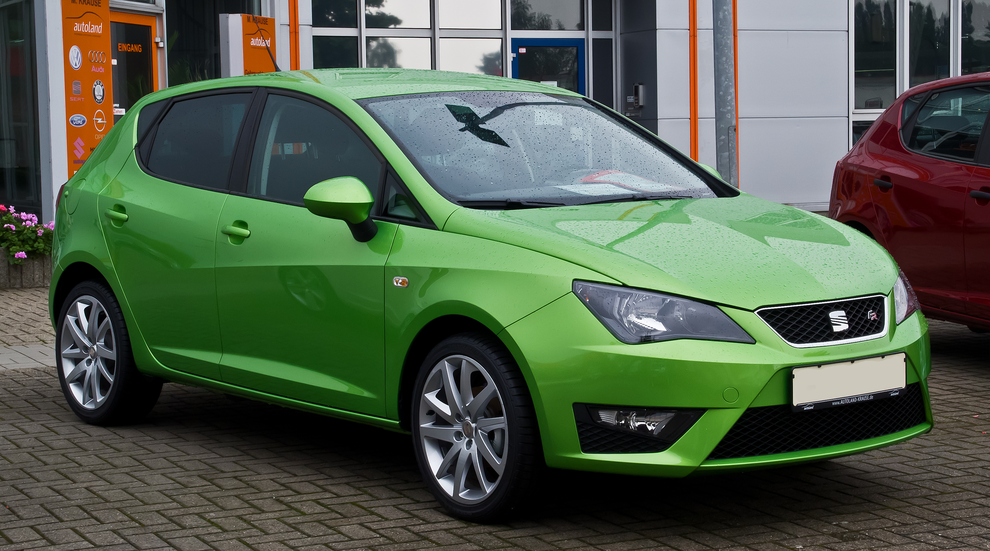 Seat Ibiza 1.2 TSI FR (6J, Facelift)